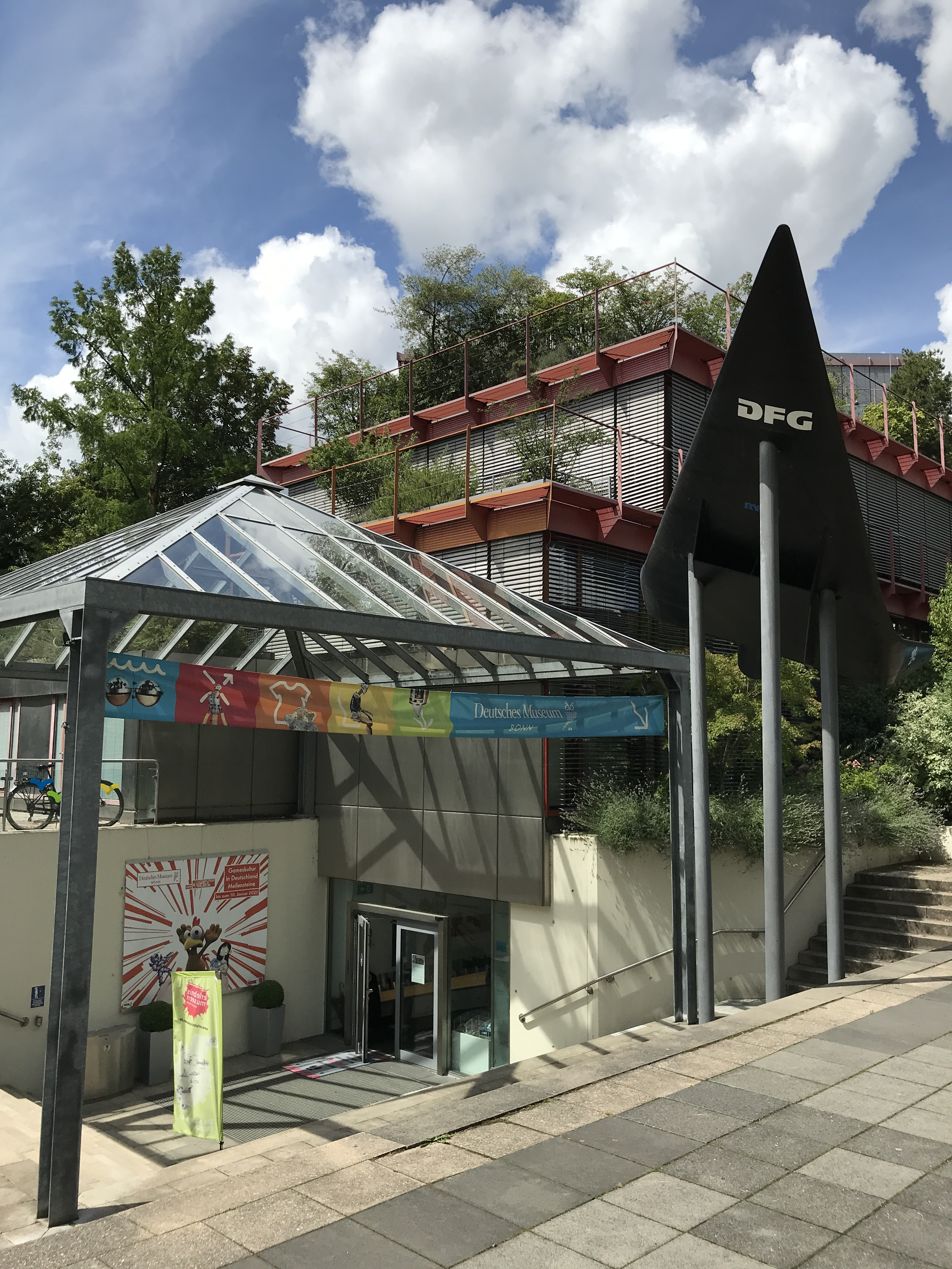 Deutsches Museum Bonn, Eingang Stand 2020-07